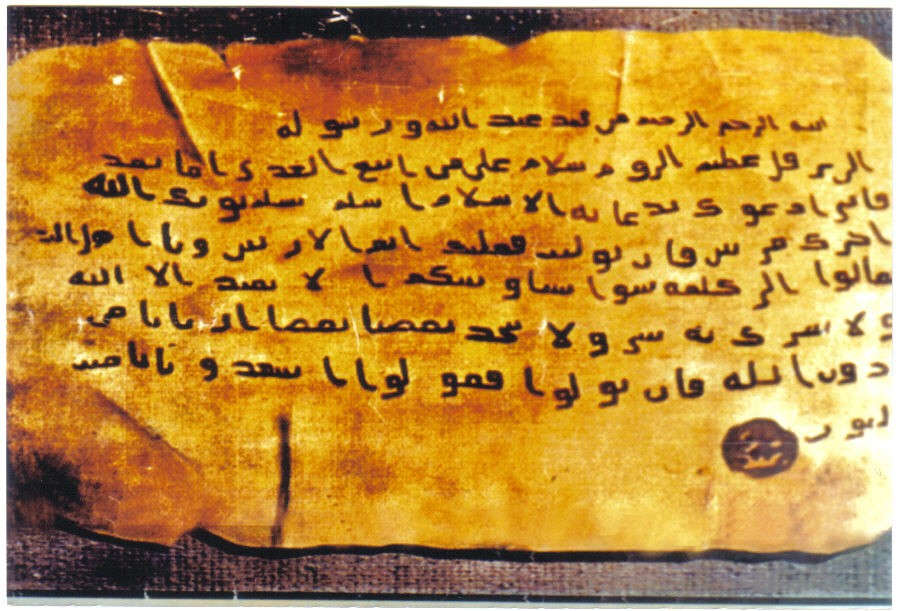 رسالة الرسول عليه الصلاة و السلام إلى هرقل